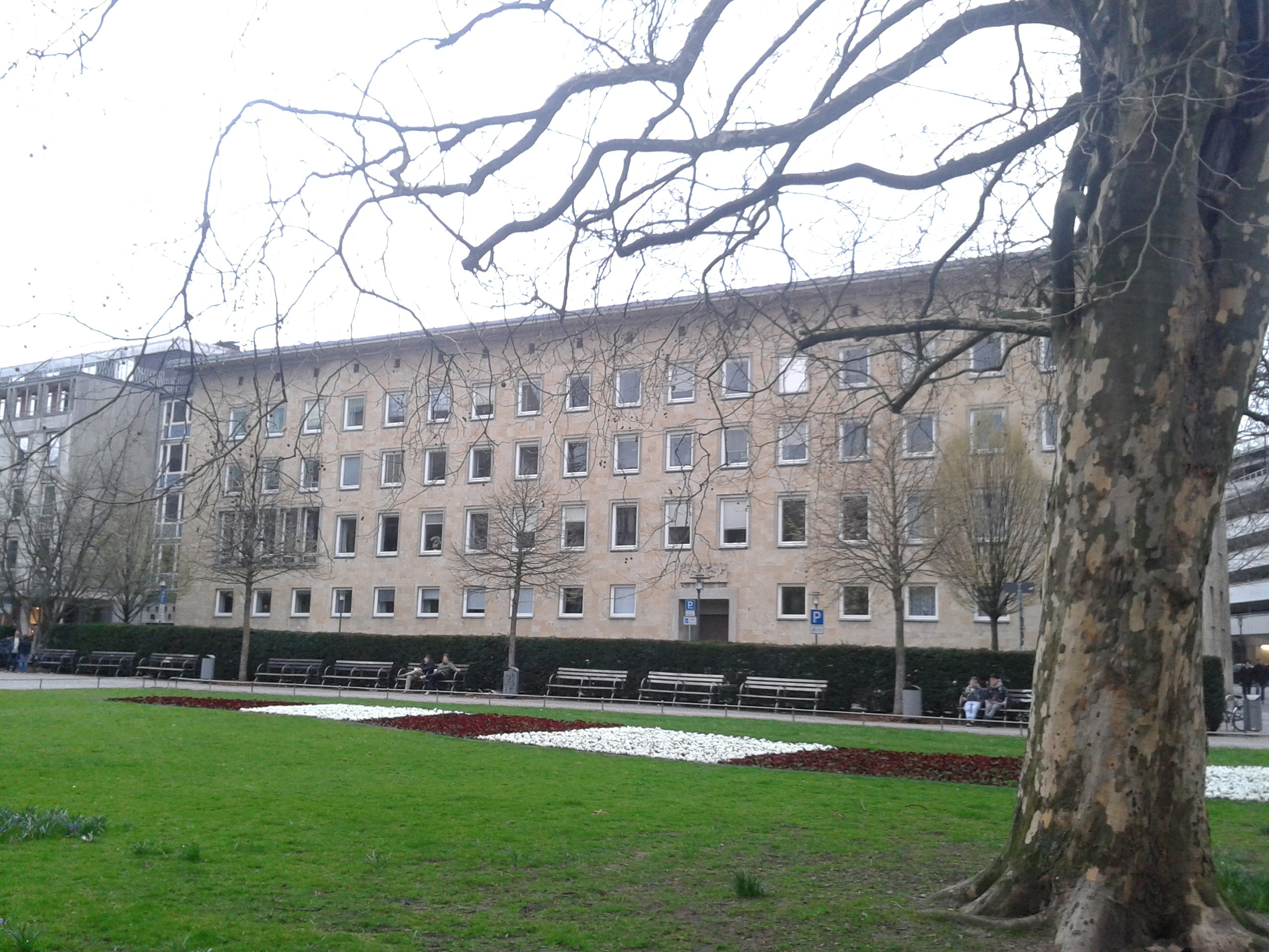 Sitz der Evangelischen Landeskirche in Westfalen in Bielefeld.